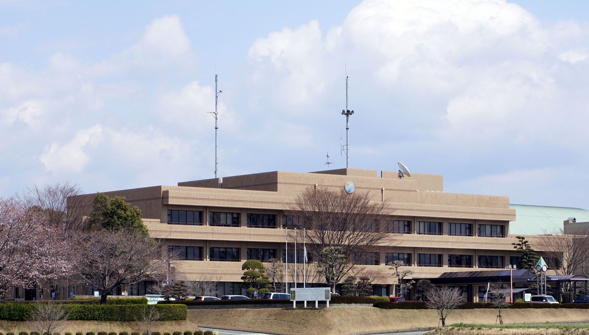 熊本県合志市 合志庁舎 外観